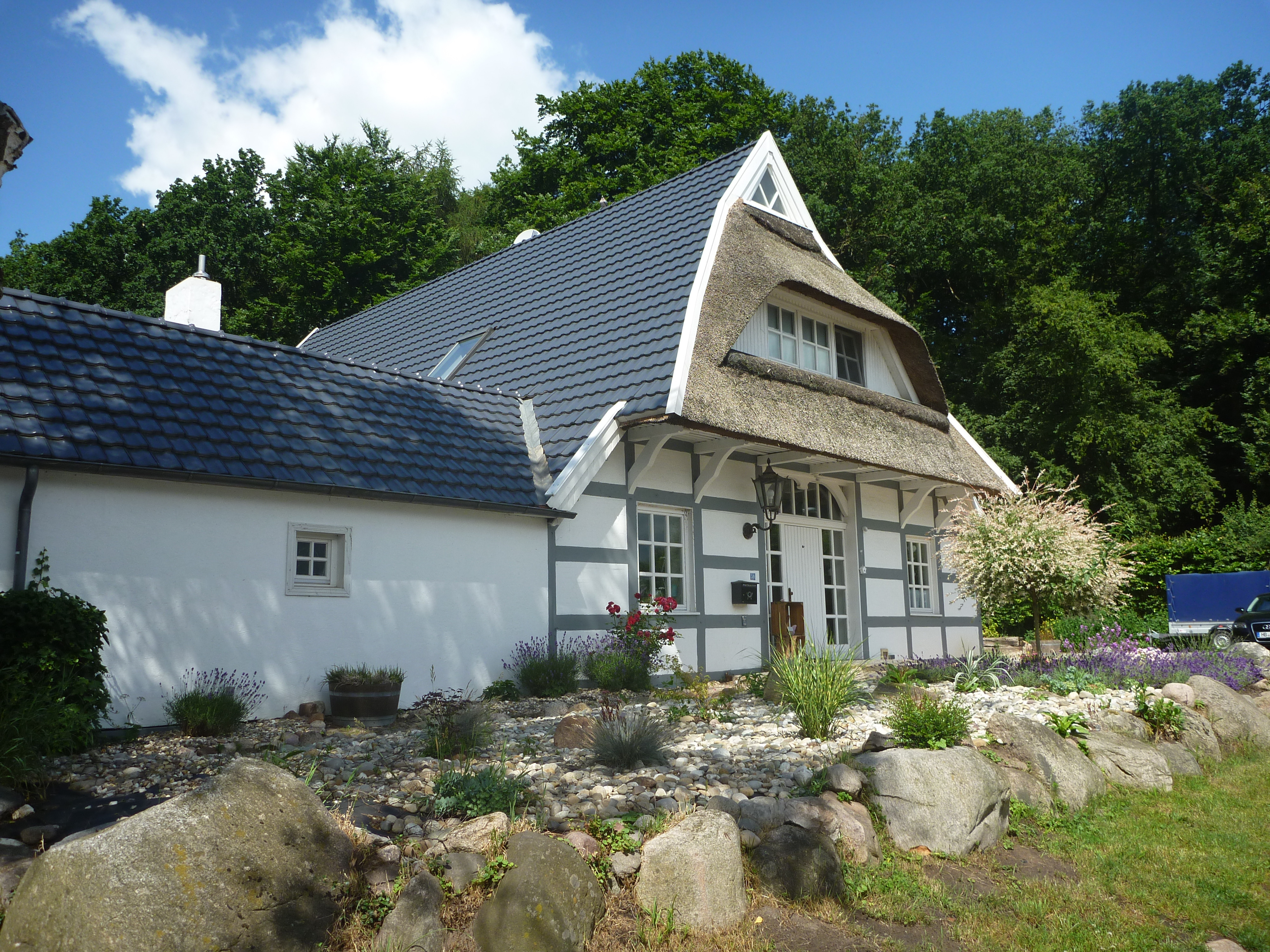 OsterhagenIhlpohl ReetgedecktesHaus. Inzwischen ist nur noch der Giebel reetgedeckt.